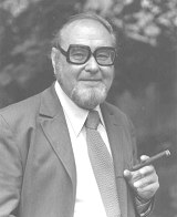 Potraitaufnahme des Prähistorikers und ehemaligen Direktors des Museums für Ur- und Frühgeschichte Thüringens in Weimar, Günter Behm-Blancke